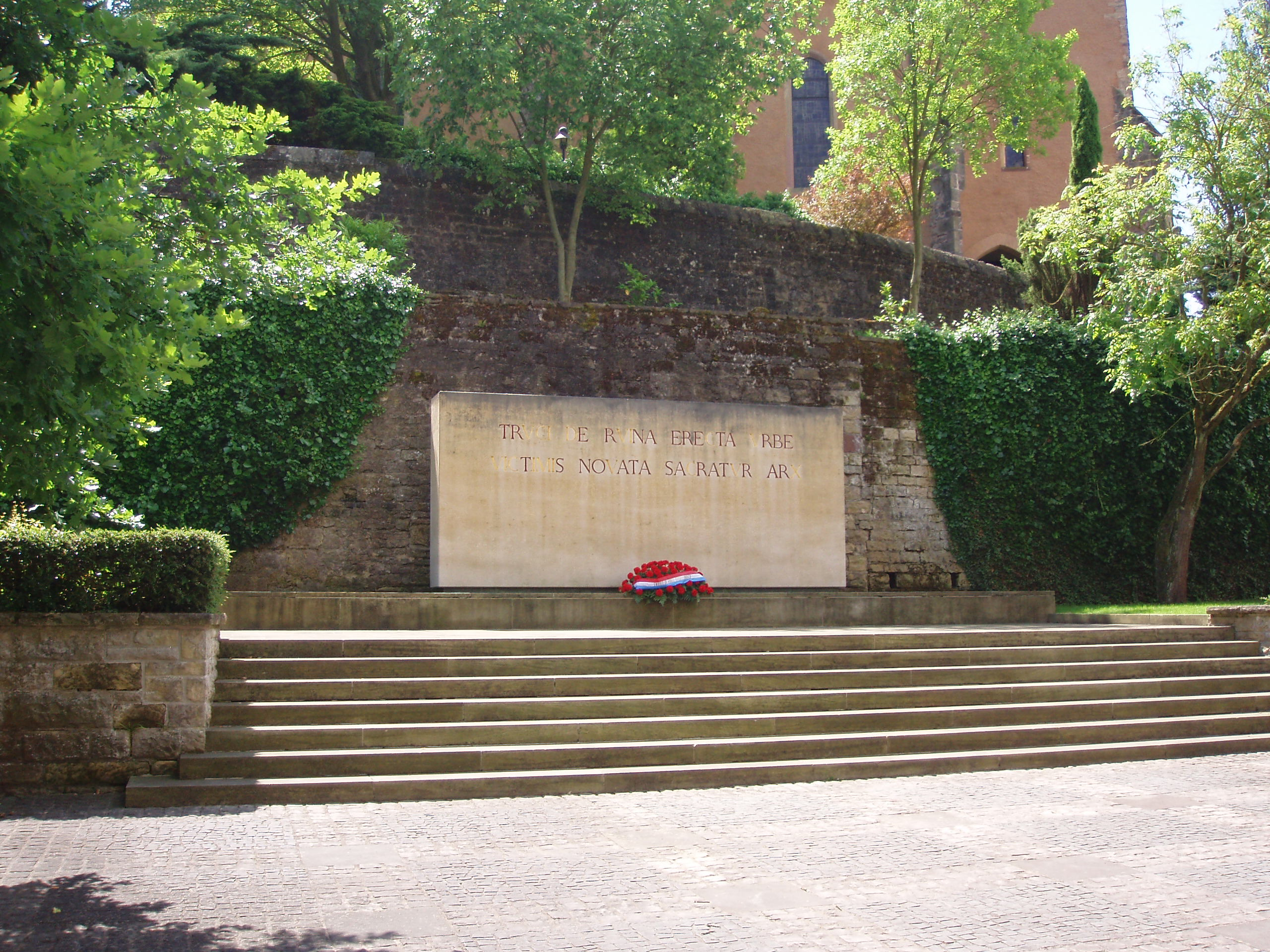 in Echternach